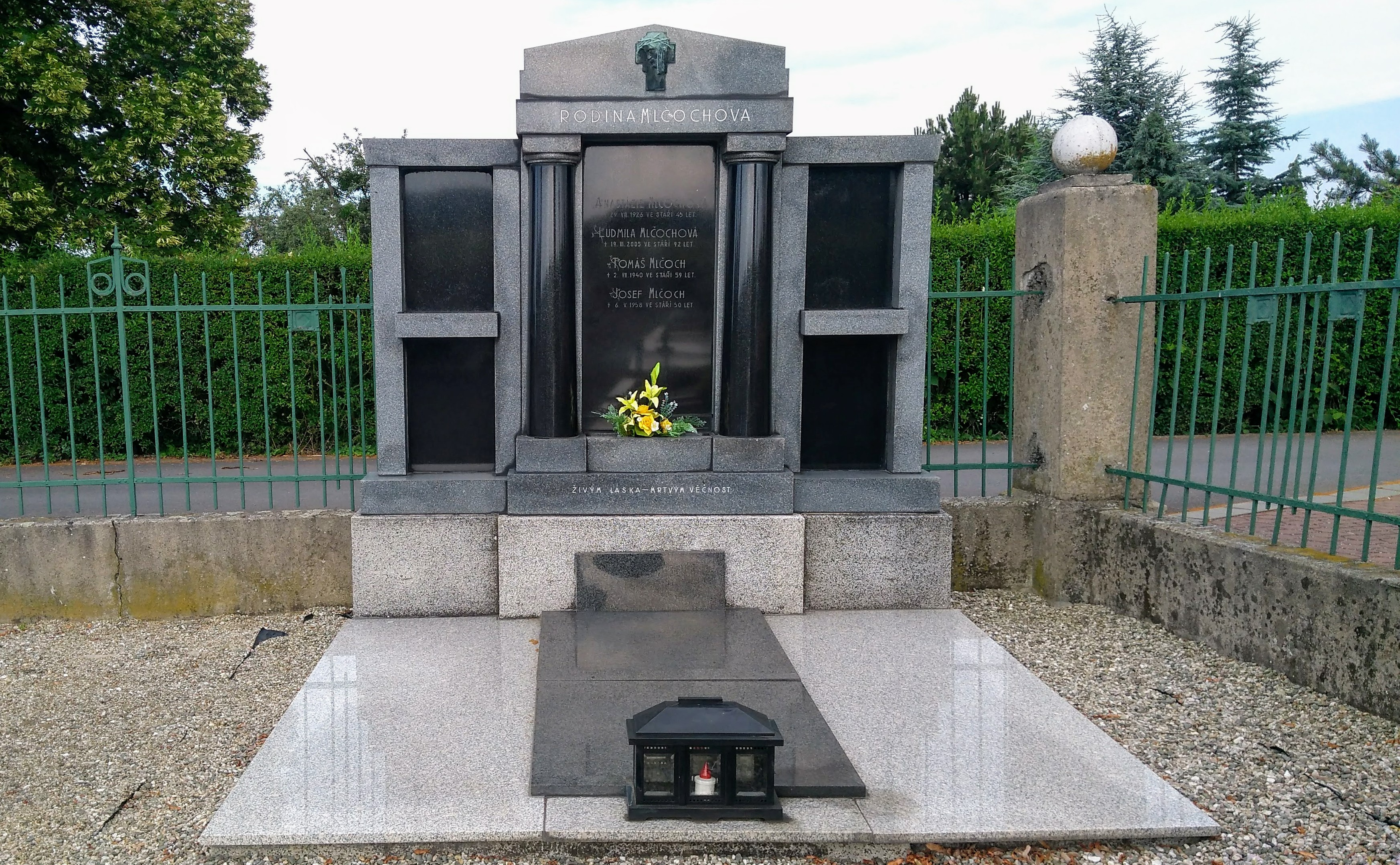 Hřbitov Skaštice - Tomáš Mlčoch (1881-1940), politik, poslanec Říšské rady